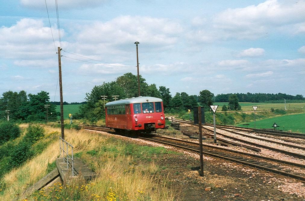 Regionalbahn aus Arnsdorf bei der Einfahrt in Dürröhrsdorf